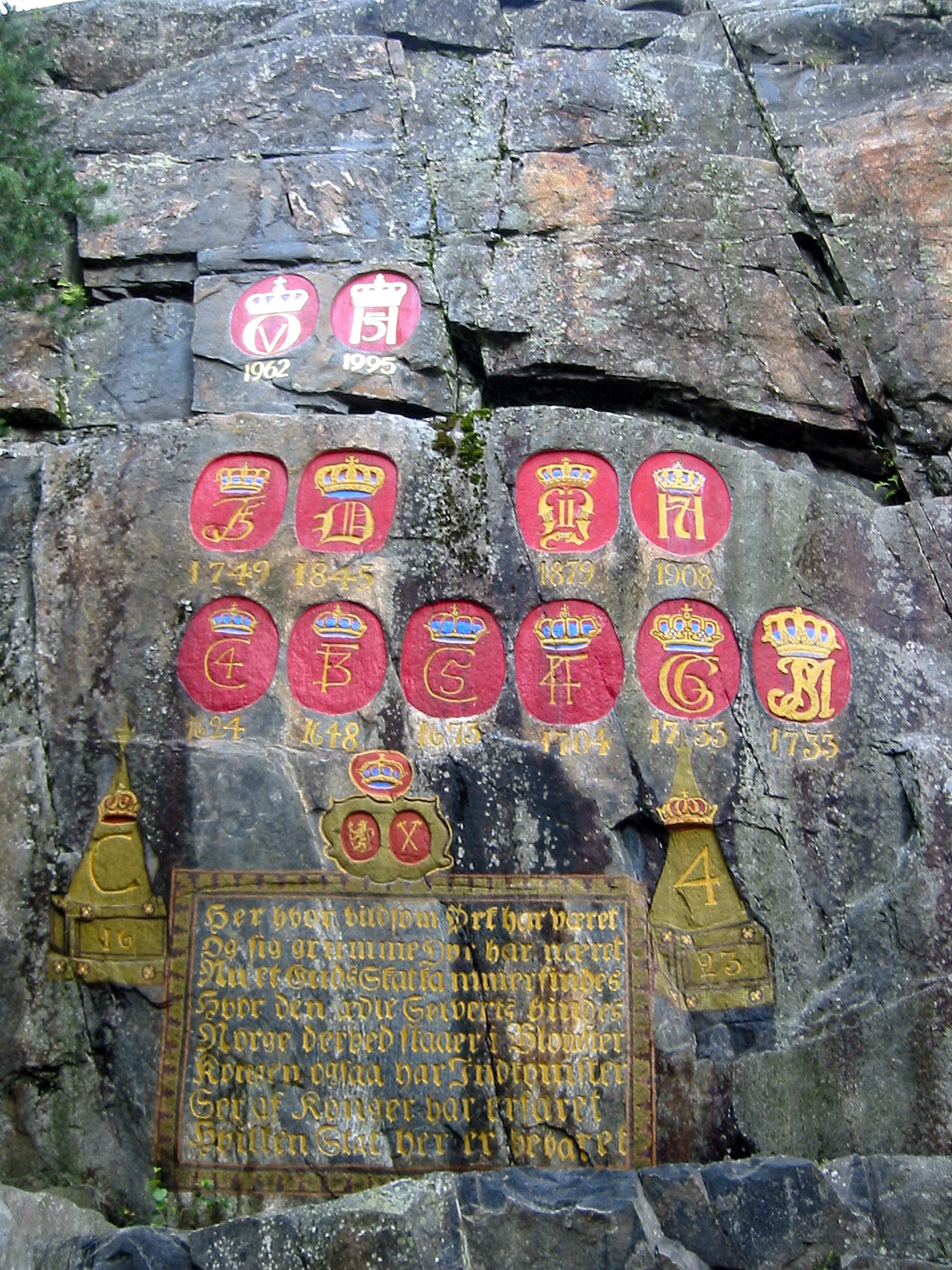 Kronene i Håvet, juli 2002.